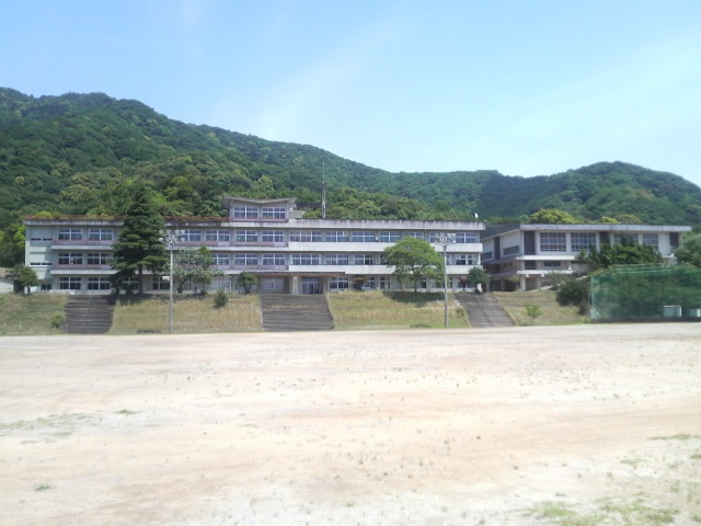 南伊勢町立南島中学校旧校舎の画像